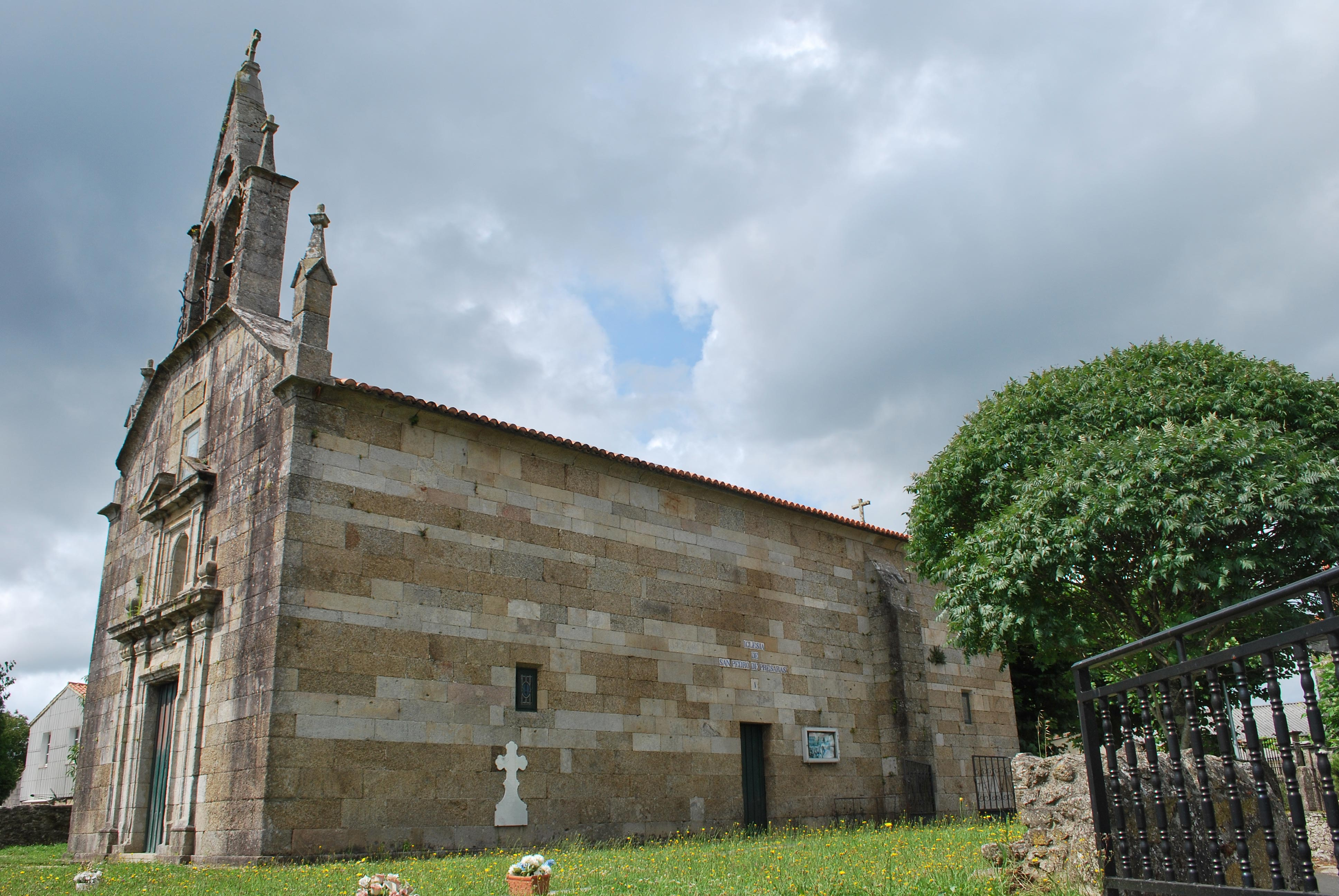 Igrexa de Eirixe en Vilasantar